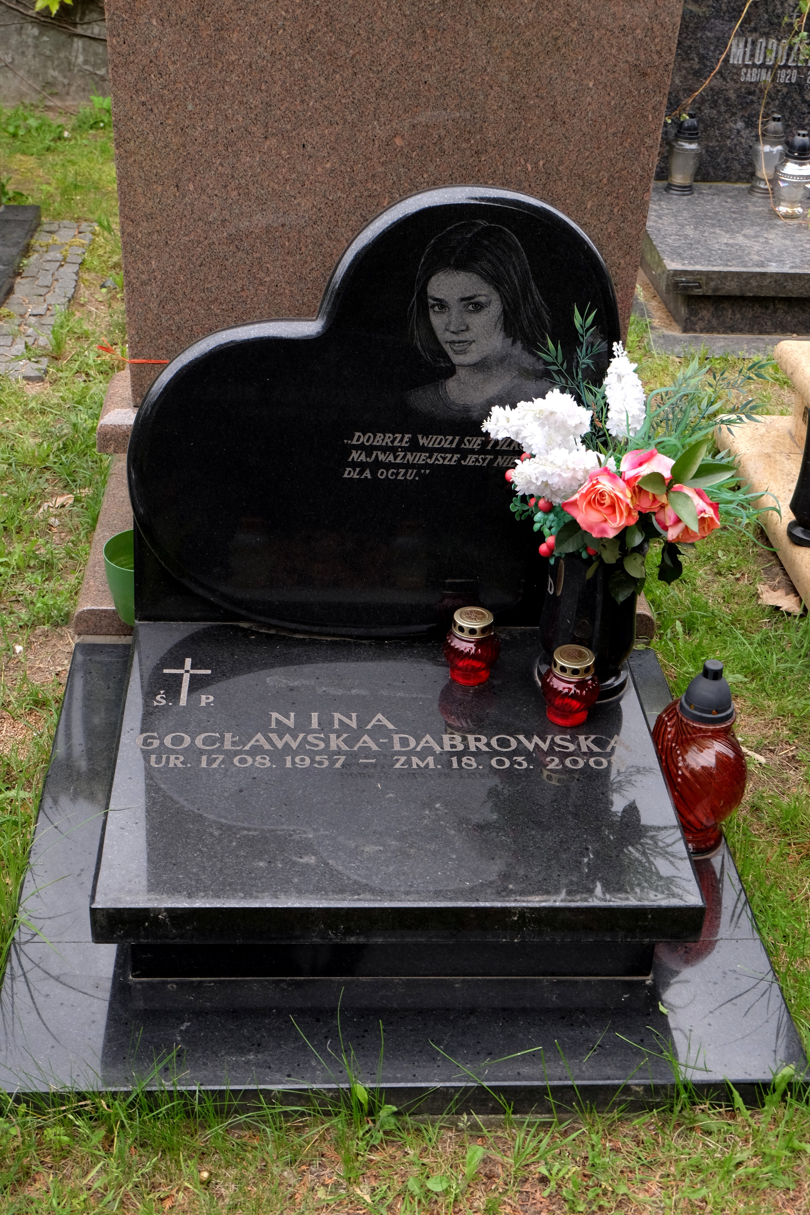 Grób aktorki i prezenterki telewizyjnej Niny Gocławskiej na Cmentarzu Wojskowym na Powązkach w Warszawie